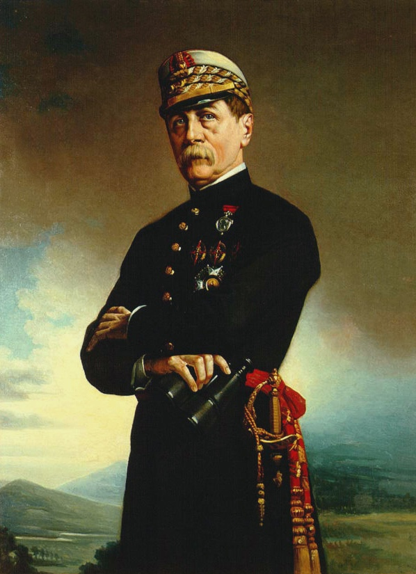 El retratado fue conde de Paredes de Nava, marqués de Sierra Bullones, capitán general del Ejército y ministro de Marina (1860-1862) Referencias: GONZÁLEZ-ALLER, José Ignacio, Catálogo-Guía del Museo Naval de Madrid, Tomo III, Ministerio de Defensa, 2003, pág. 126. Óleo sobre lienzo de autor anónimo de escuela española. Representa a Juan de Zabala y de la Puente en tres cuartos de pie y en escorzo hacia su derecha. Tiene el cabello oscuro, bigote cano y los brazos cruzados, el izquierdo sobre el derecho, con cuya mano sostiene unos prismáticos. Viste uniforme de capitán general del Ejército, con ros, fajín y sable. Sobre el pecho lleva de arriba abajo: la medalla de África, tres cruces laureadas de San Fernando y la gran cruz laureada de San Fernando.